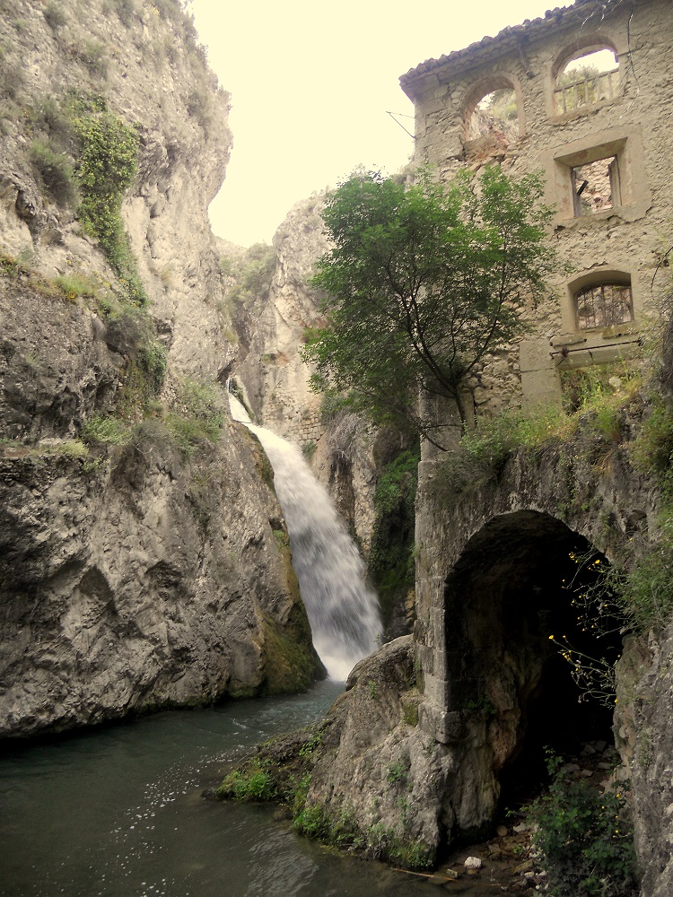 Benilloba - Molino del Salt